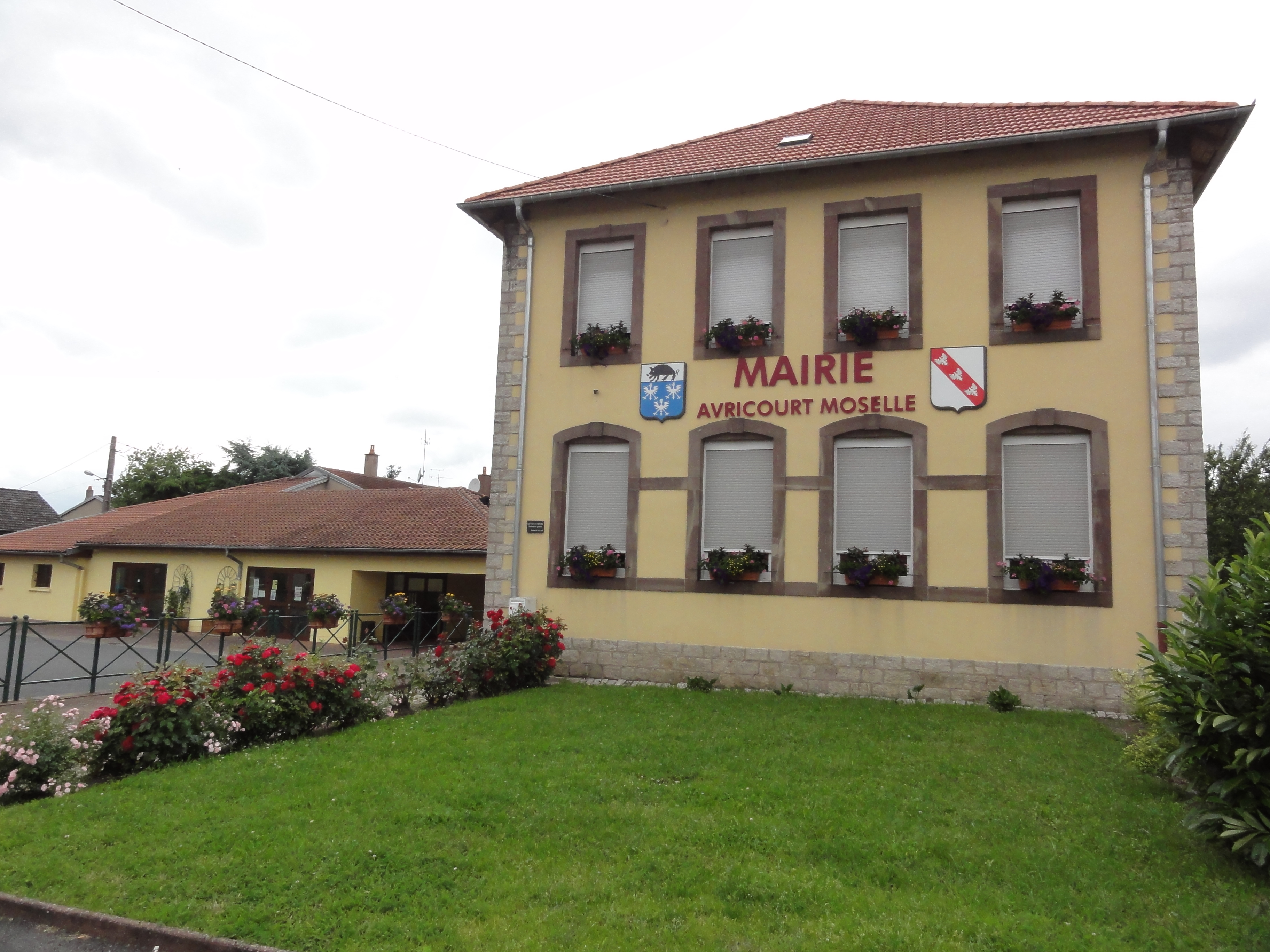 Avricourt (Moselle) mairie Avricourt Moselle